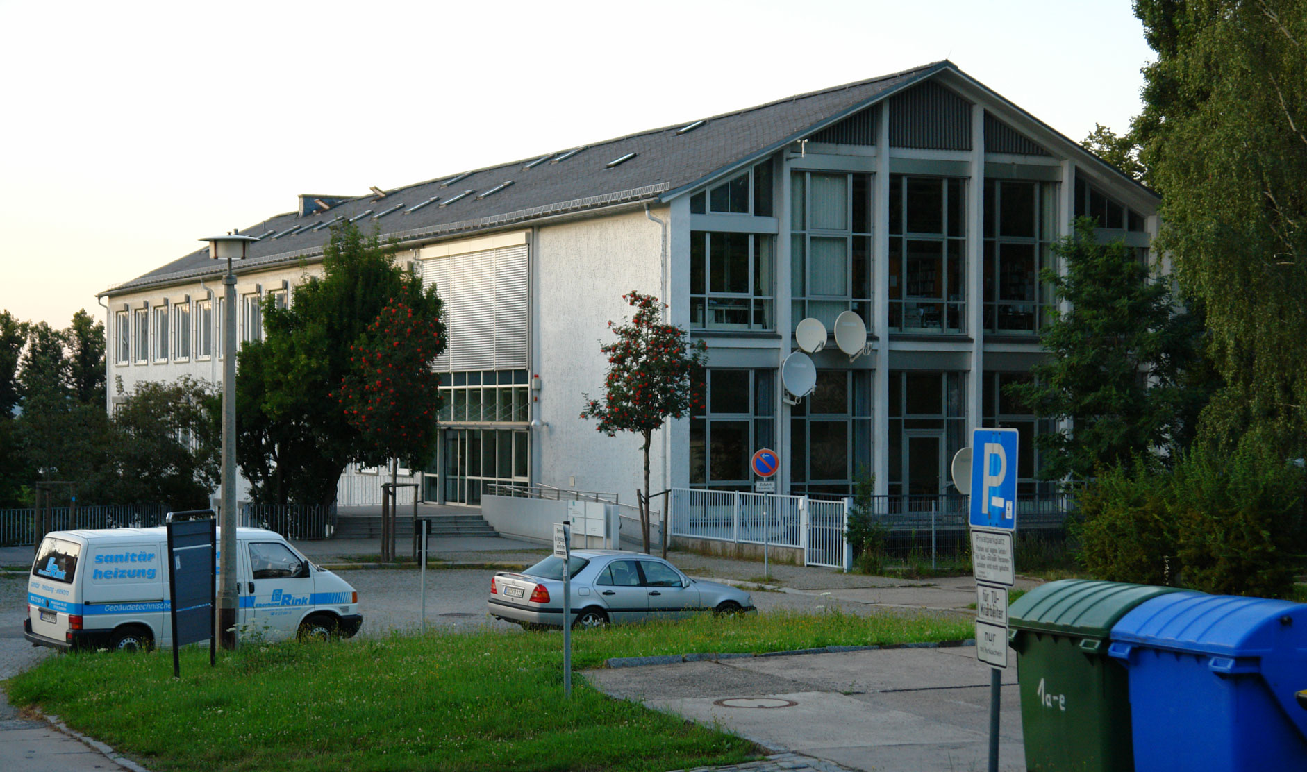 Fraunhofer-IVI-ISS Dresden